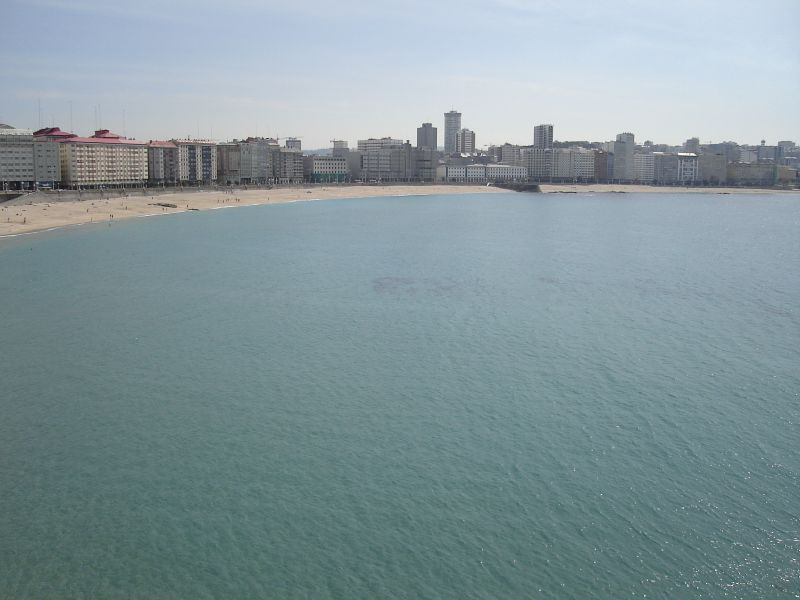 A Coruña